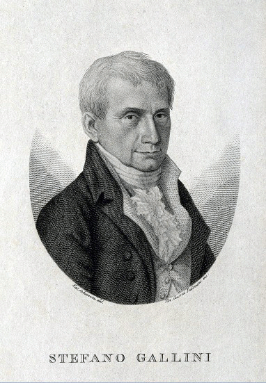 Stefano Gallini